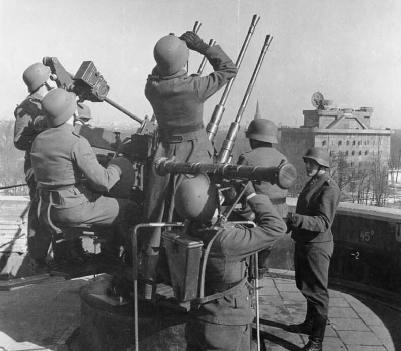 Zentralbild II. Weltkrieg 1939-1945 Flugzeugabwehr auf dem Flakturm am Zoo in Berlin Vierlingsflak der Luftwaffen-Flakartillerie in Feuerbereitschaft. 16.4.1942 Aufnahme: Pilz